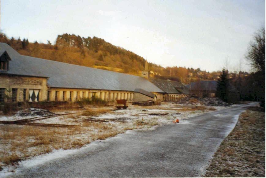 Spalthaus fun der Grouf Johanna